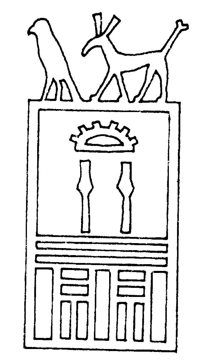 Serech panovníka Chasechemueje (kresba podle předlohy)